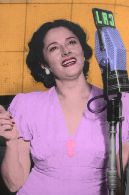 MERCEDES SIMONE